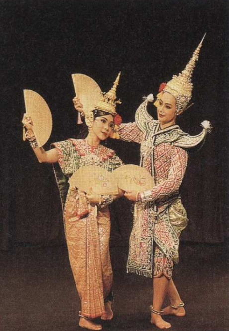 ภาพการแสดงชุดระบำฝรั่งคู่จาก วิพิธทัศนา กรมศิลปากร